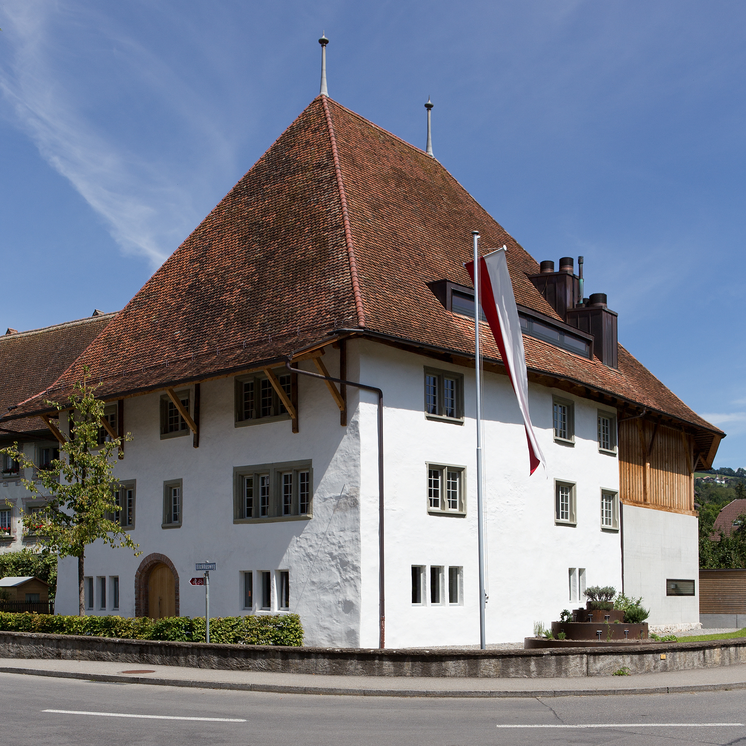 Das grössere Höchhus von Steffisburg